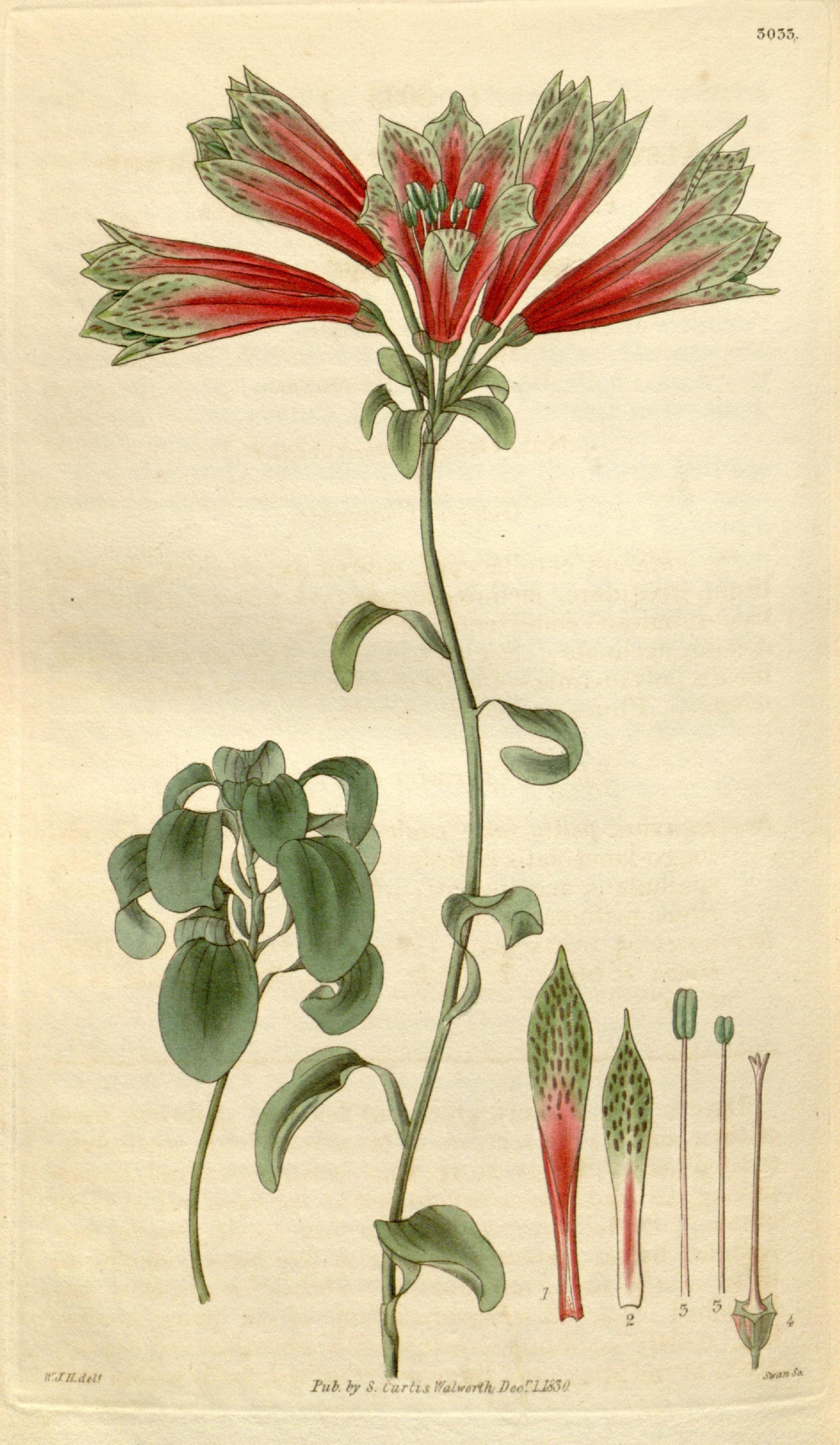 5035. I jtrt" J 1 *